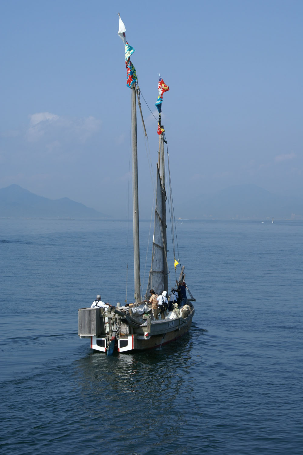 Utasebune at Kannon Marina, Hiroshima